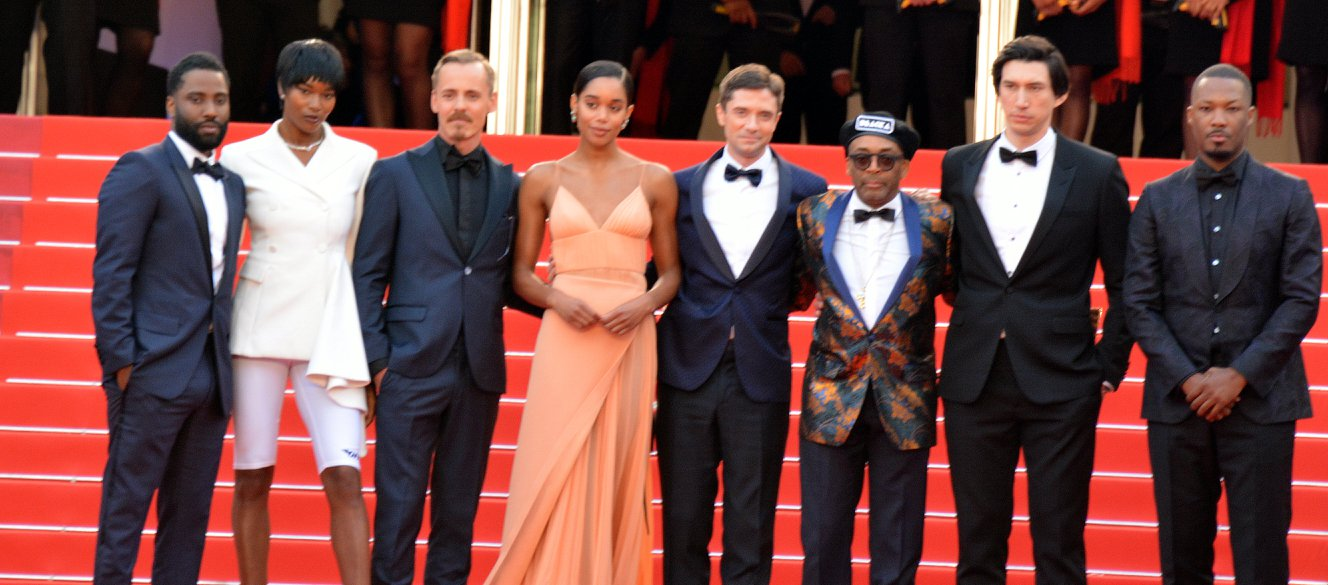 festival de Cannes.